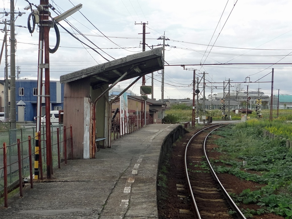 富山地方鉄道本線西滑川駅ホーム